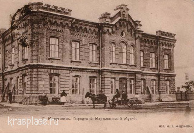 Минусинский краеведческий музей, архитектор В А Рассушин